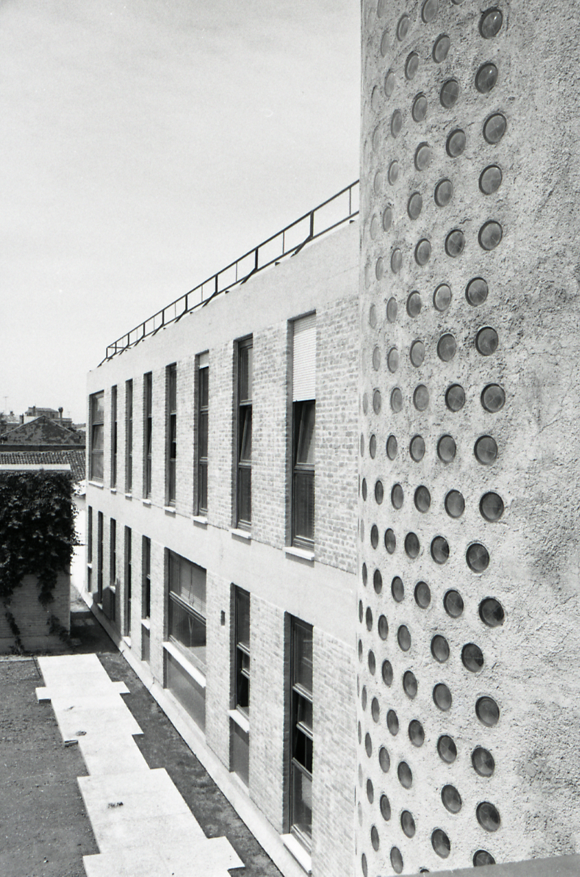 Servizio fotografico : Venezia, 1962 / Paolo Monti. - Strisce: 4, Fotogrammi complessivi: 23 : Negativo b/n, gelatina bromuro d'argento/ pellicola ; 35 mm. - ((I fotogrammi hanno una doppia numerazione. . - Sul portanegativi: Leica Plus X. - Sul dorso del portanegativi Monti specifica: "vedi 105. Arch. Capuzzo - Castello 604 - Venezia". - Occasione: Documentazione del Centro sperimentale del vetro. - Fonte: Agenda di Paolo Monti: Foto Leica 1 / 1-51 verde, 1-110 nera (1958-1963), presso Archivio Paolo Monti